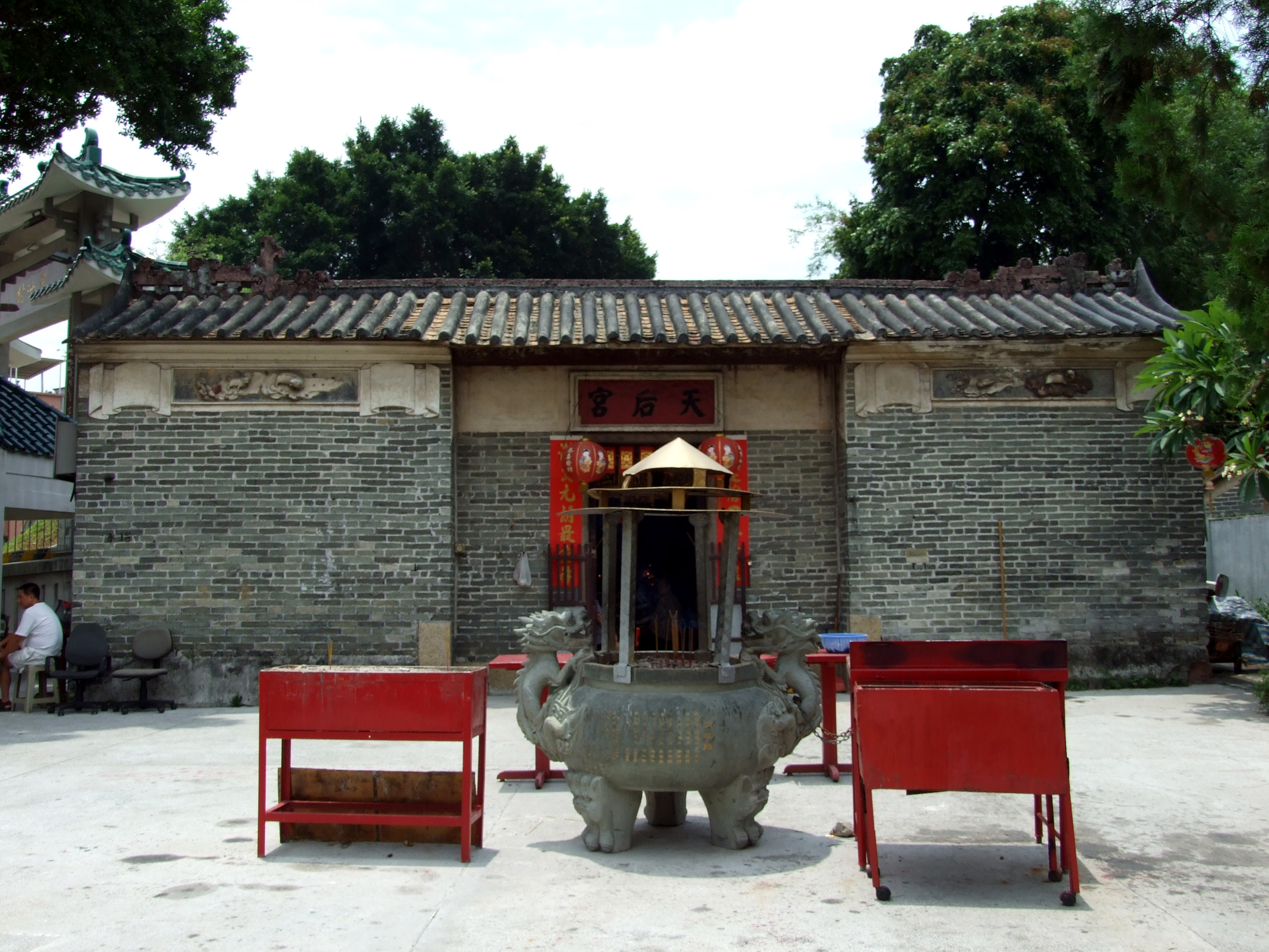 中文（香港）: 鳳池村天后宮。